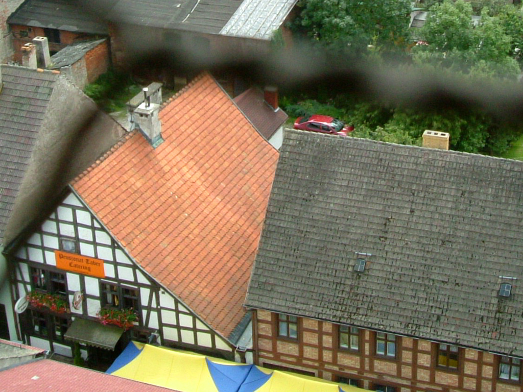 Gasthaus Taber in Dobra Nowogardzka und nebenstehendes Fachwerkhaus, Blick vom Kirchturm, aufgenommen während des Stadtfests Jarmark Doberski 2007